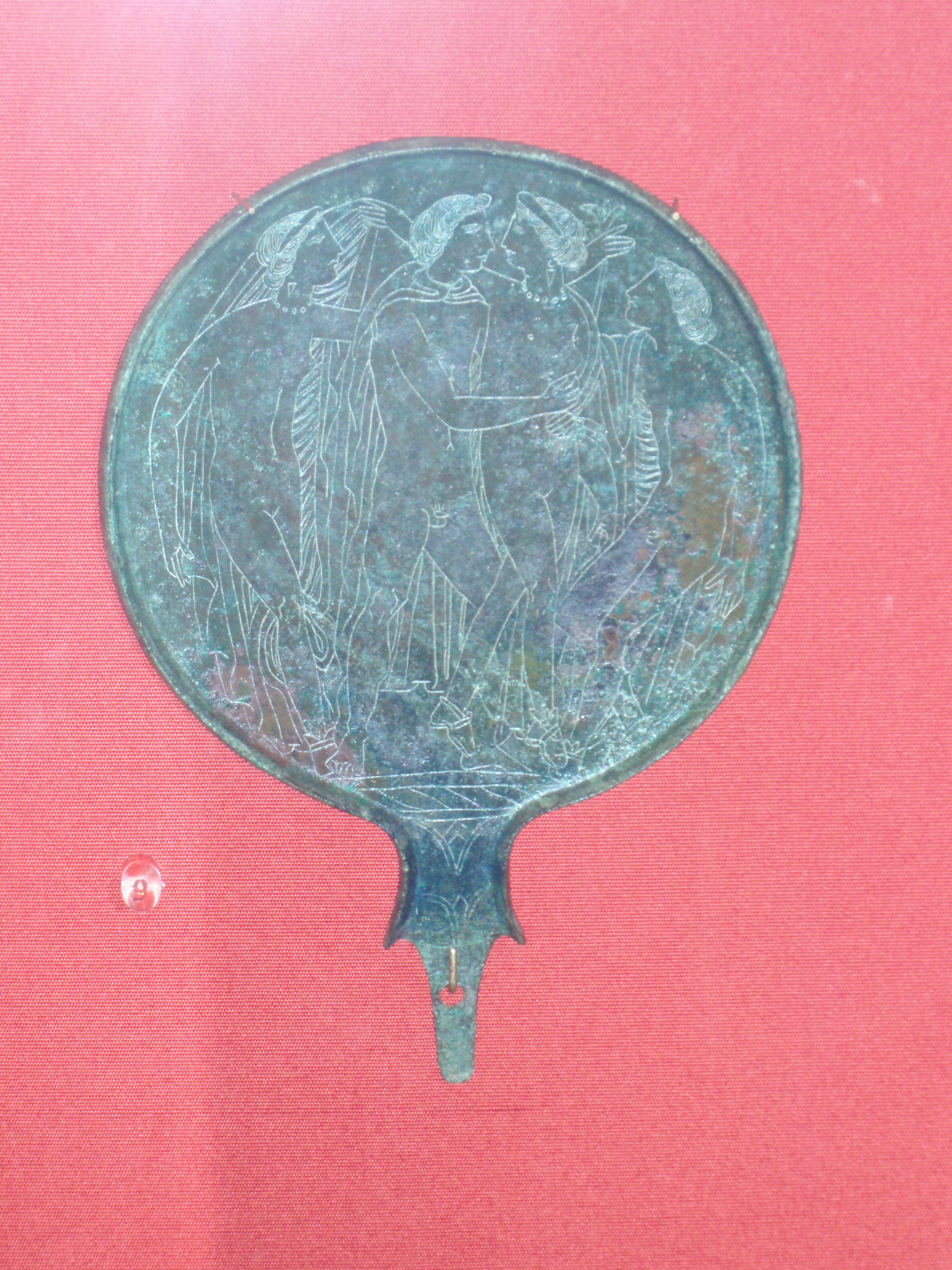 Museo archeologico statale di Arcevia - 5